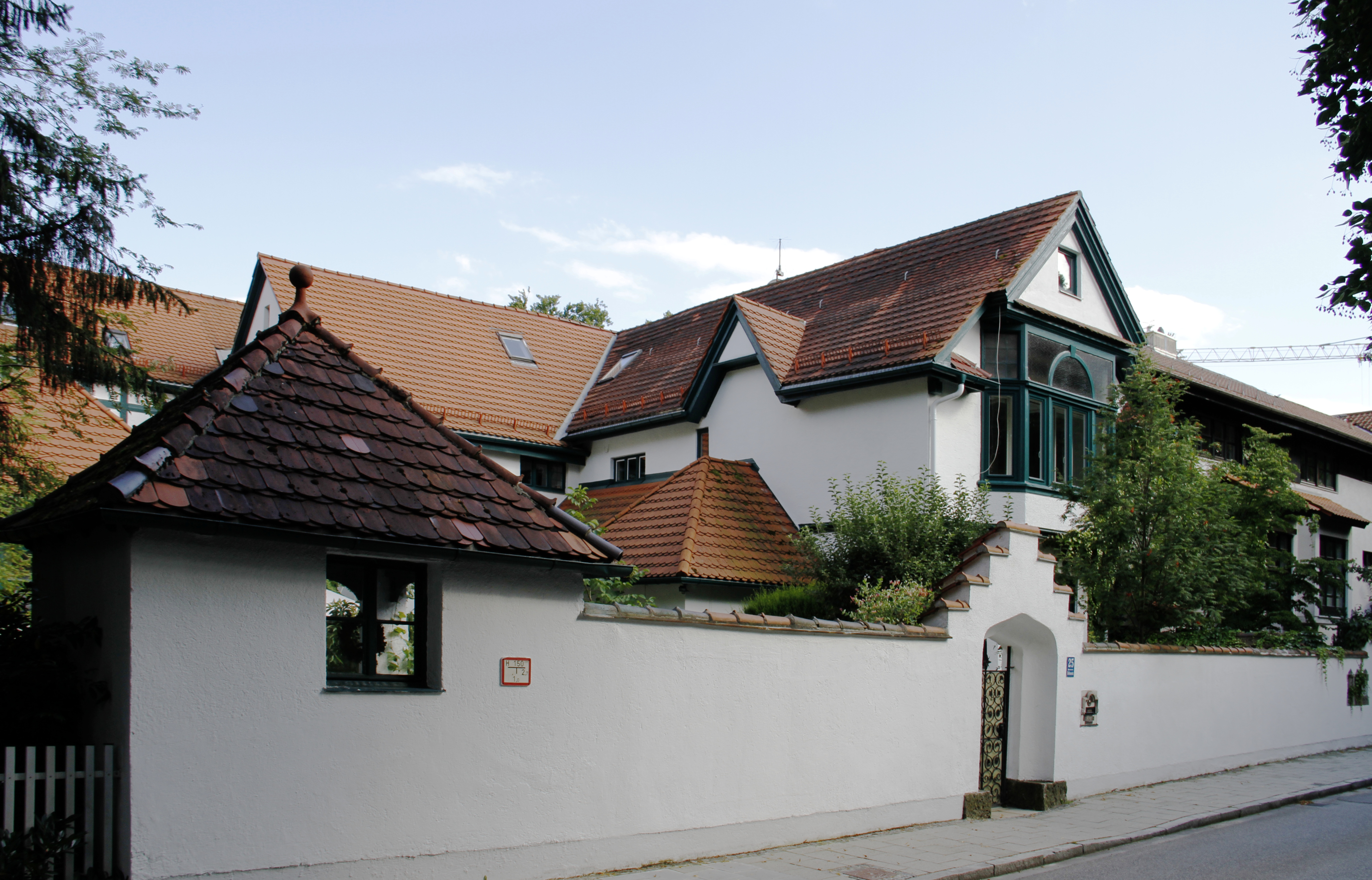 Heilmannstraße 25, München, Villa im englischen Landhausstil, errichtet 1901 von Gustav Schellenberger als Baubüro für die Villenkolonie Prinz-Ludwigs-Höhe. 1903 gekauft von Josephine Heilmann, einer Tochter des Immobilienentwicklers der Kolonie, Jakob Heilmann, und ihrem Mann Roman Oberhummer und erweitert durch Jakob Heilmann und Max Littmann. Damals entstand die gotisierende Einfriedung des Grundstücks. 1980/81 durch einen Anbau im Süden zur Wohnanlage erweitert.